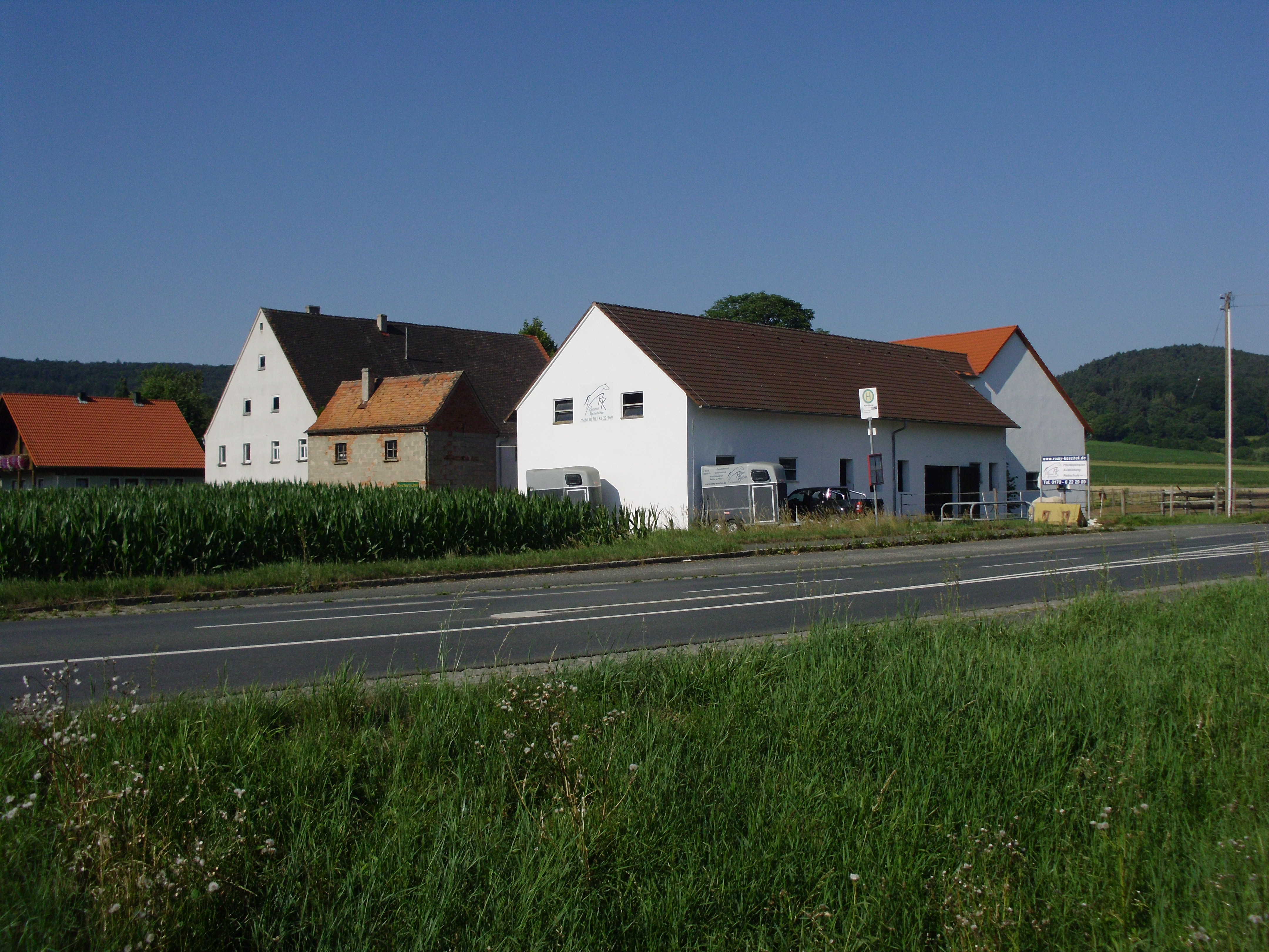 Kochsmühle, Gemeindeteil von Thalmässing im mittelfränkischen Landkreis Roth